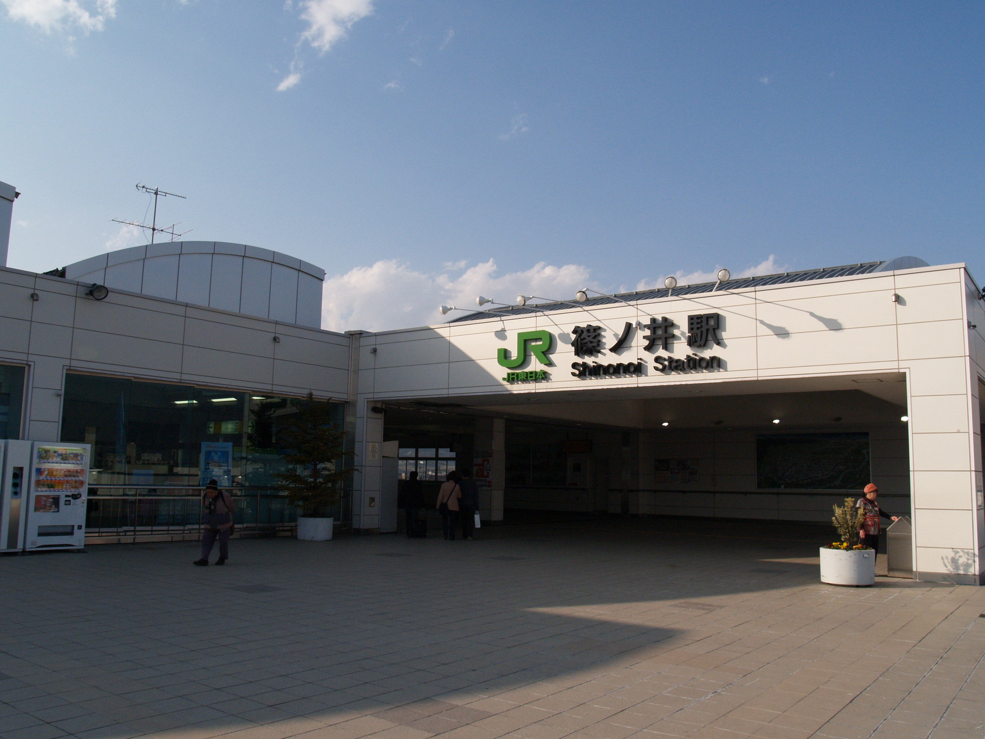 篠ノ井駅の入口